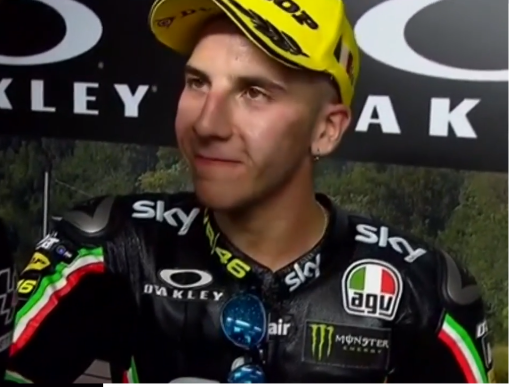 Andrea Migno di ItaliaGP 2017